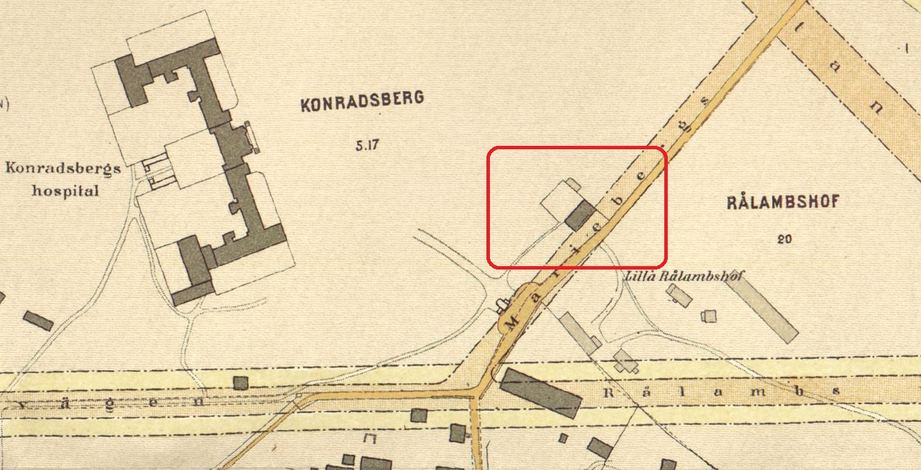 Del av karta över Stockholm visande Konradsberg, Hedvigsberg, Lilla Rålambshof mm